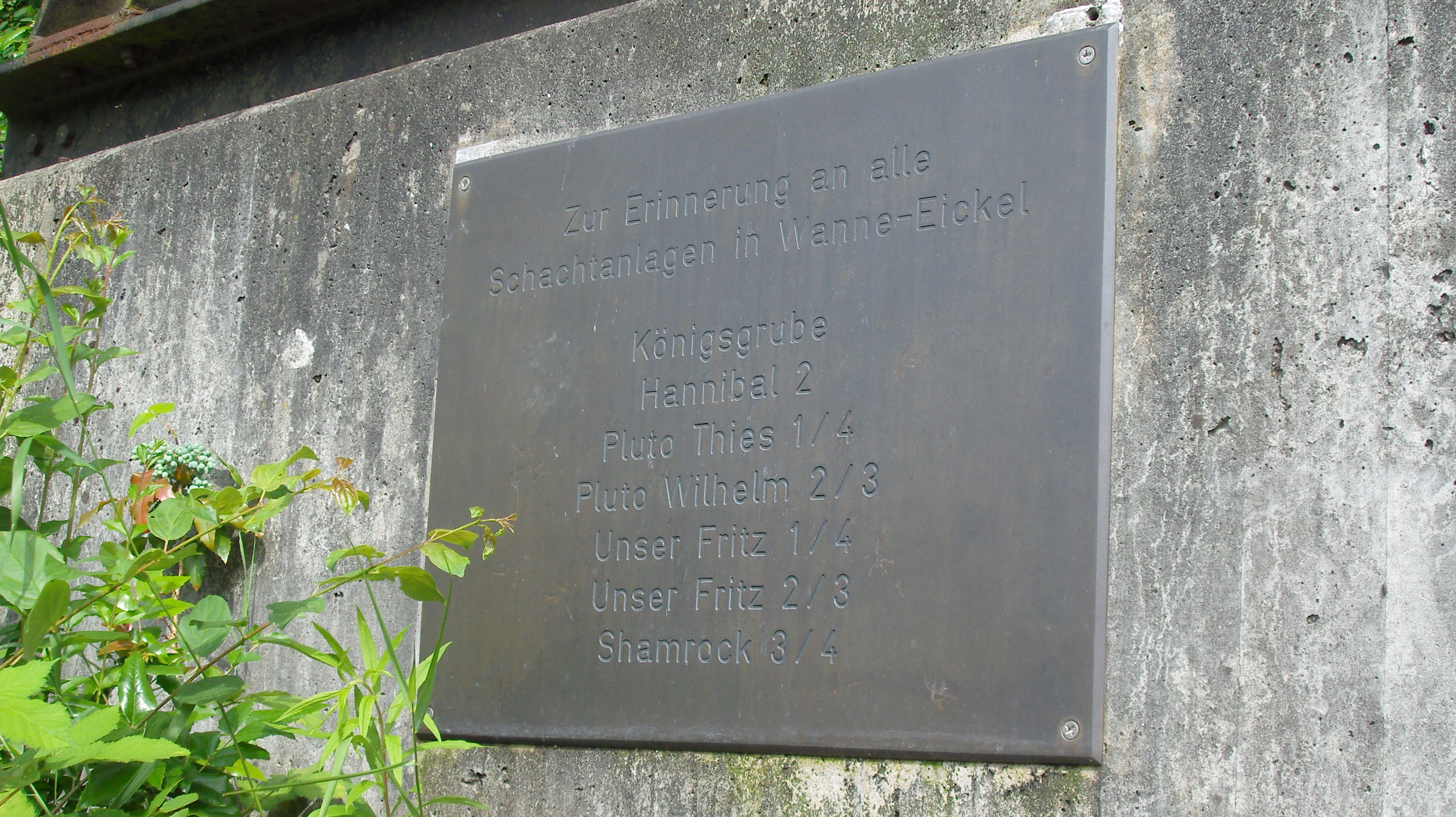 Tafel an der Seilscheibe der ehemaligen Zeche Consolidation am Drei-Männer-Eck des Wanne-Eickel Hbf zur Erinnerung an die ehemaligen Zechen in Wanne-Eickel